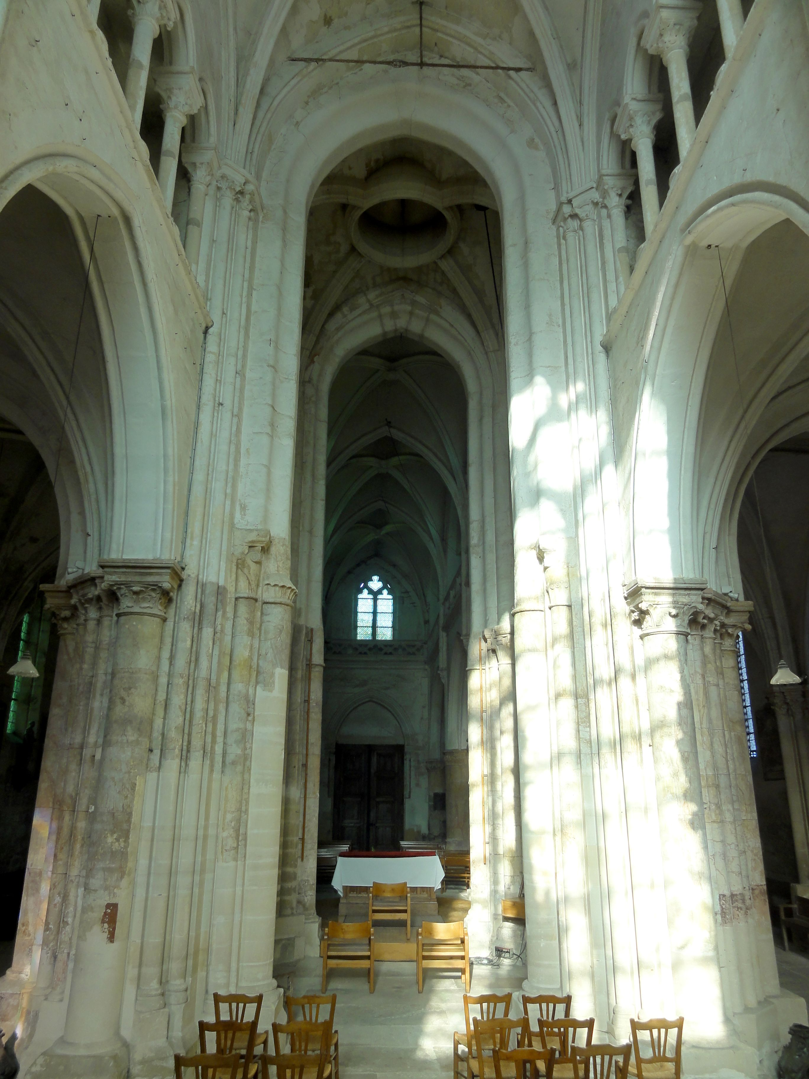 Choeur, vue vers l'ouest.